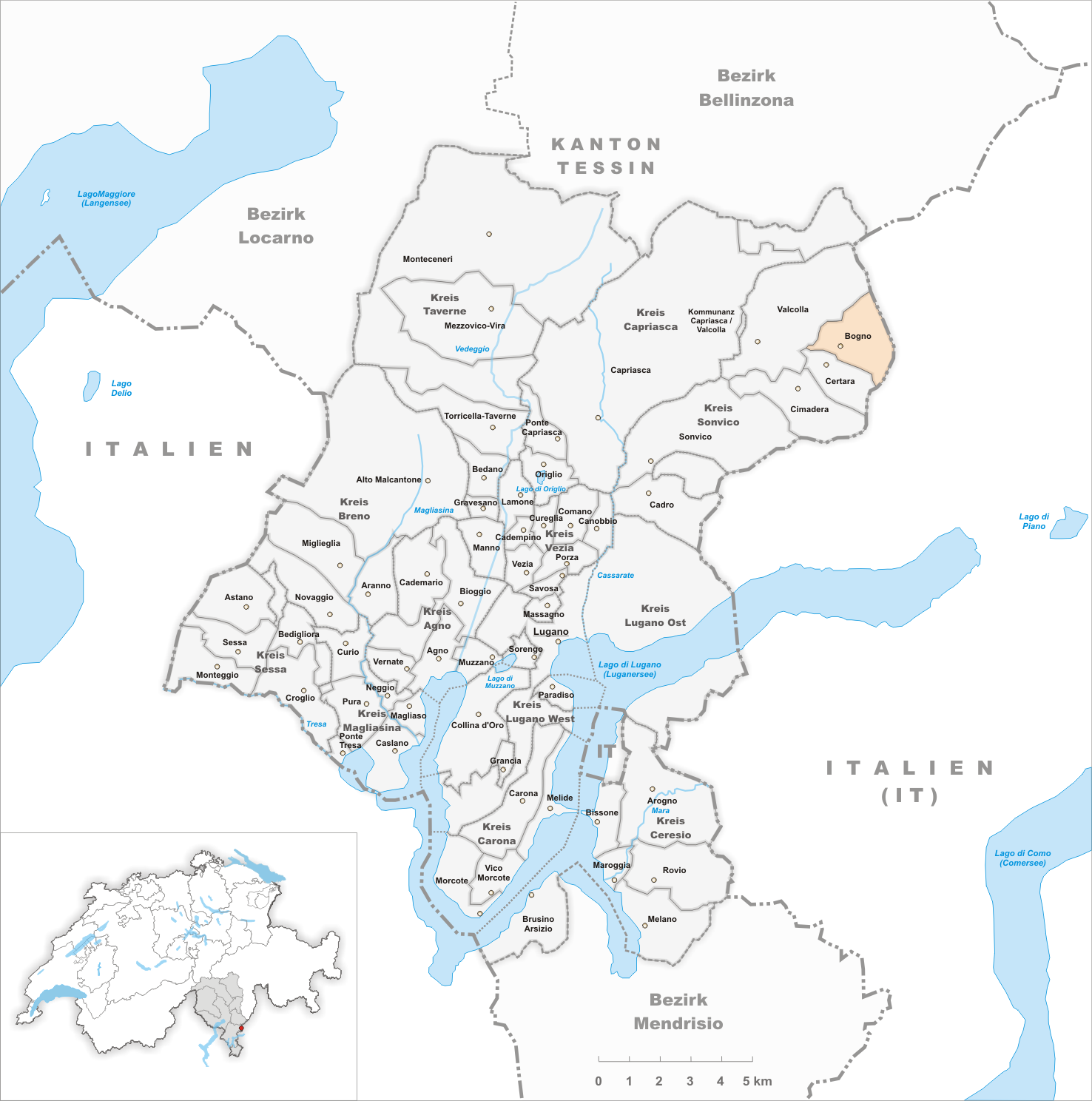 Municipality Bogno